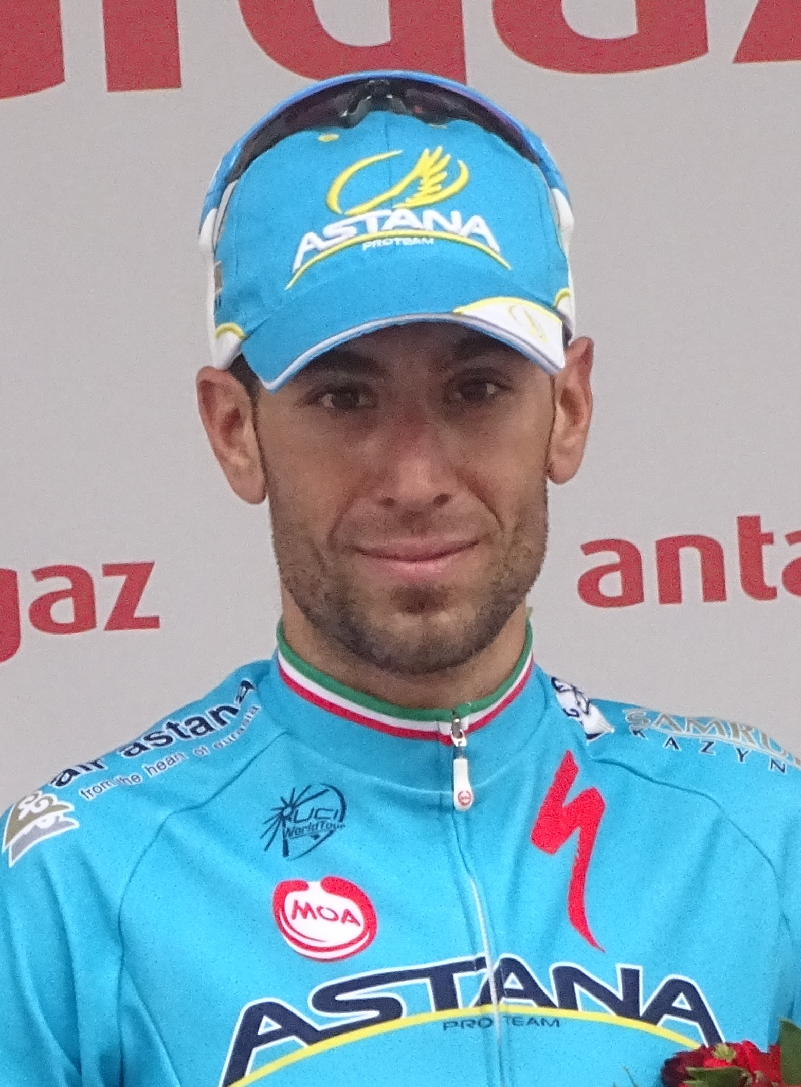 Reportage réalisé le mardi 7 juillet à l'occasion de l'arrivée de la quatrième étape du Tour de France 2015 à Cambrai, Nord-Pas-de-Calais, France.